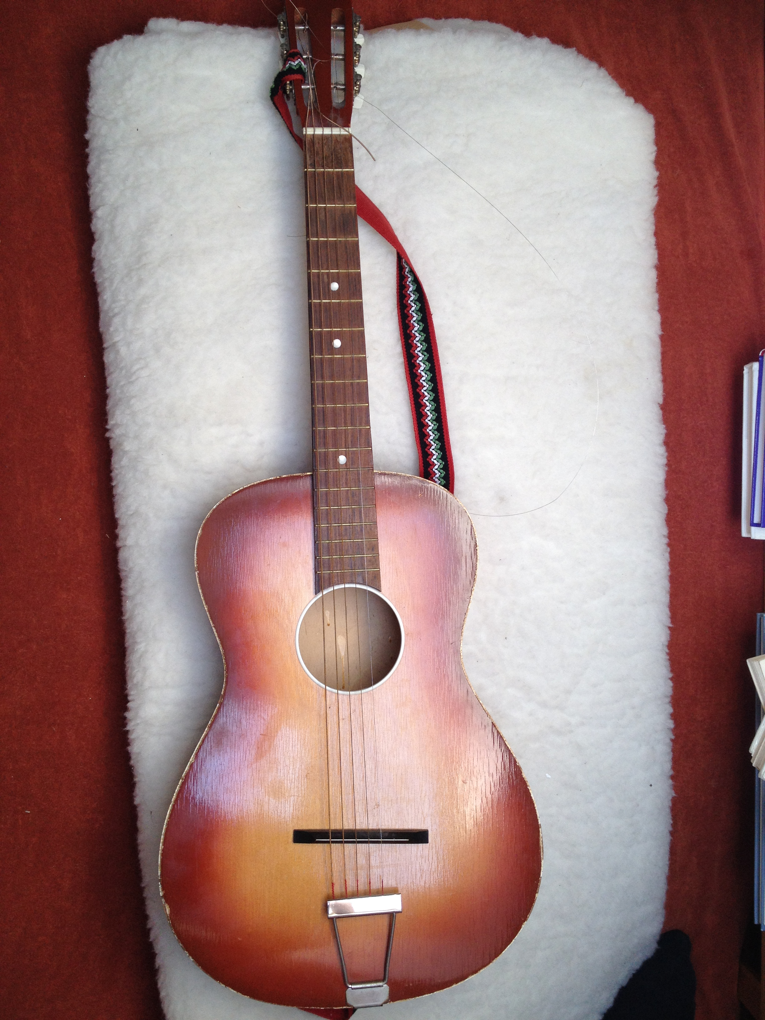 Elektroakustická kytara dětská